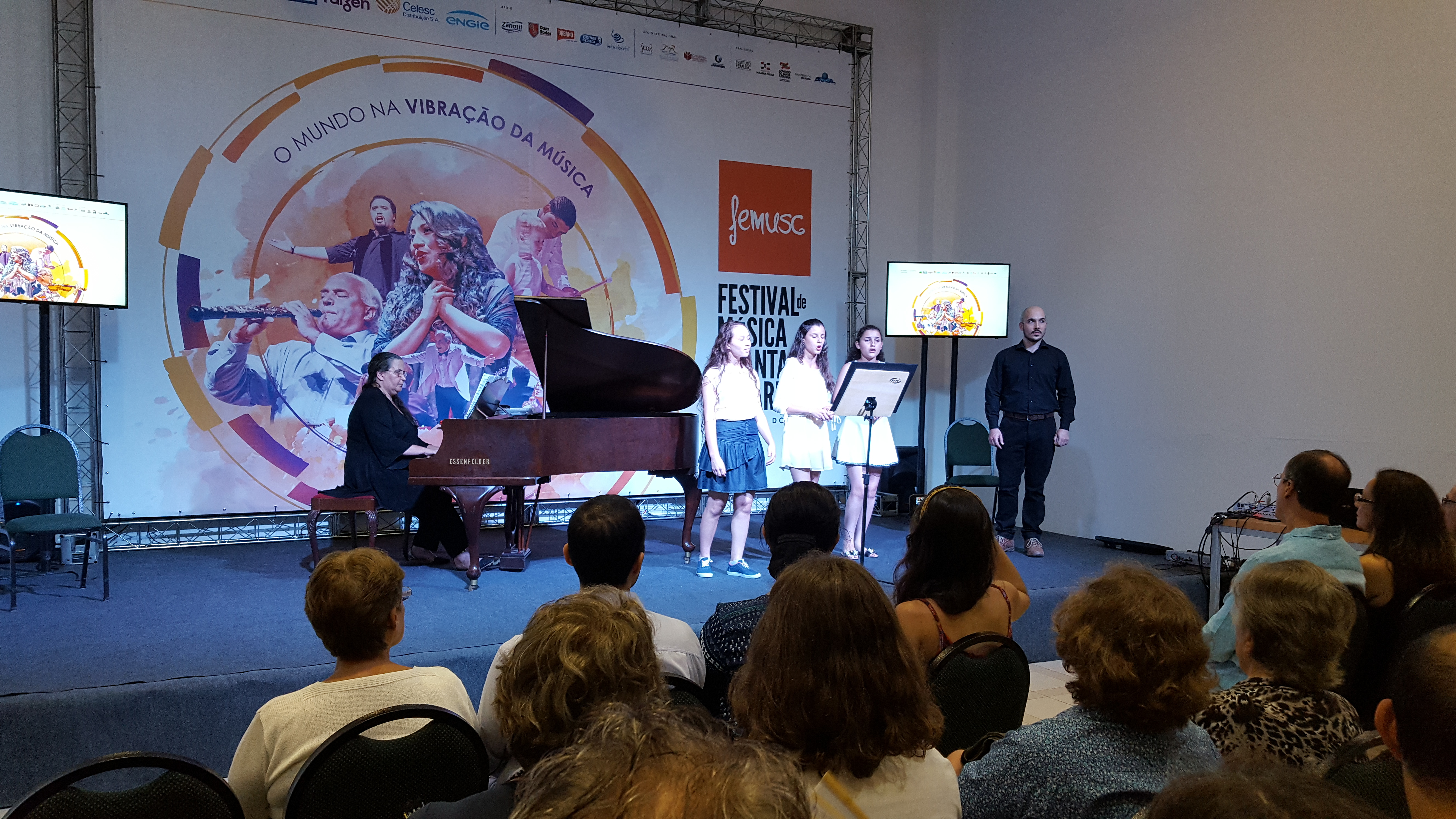 Femusc 2017, recital de canto lírico.